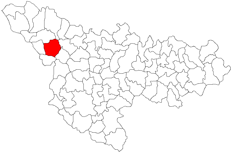 Lenauheim, judetul Timis Licensing Categorie:Hărţi ale judeţului Timiş